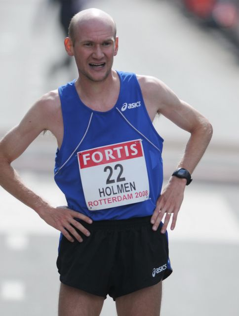 Janne Holmen during Rotterdam Marathon 2008